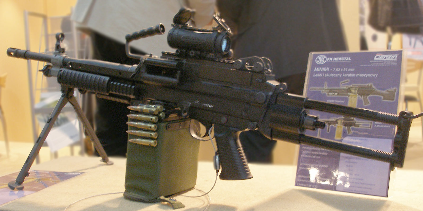 FN MINIMI